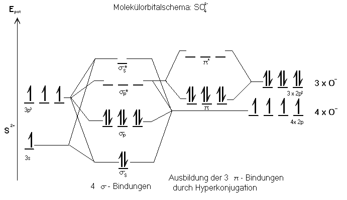 qualitatives Molekülorbitaldiagramm für das Sulfation